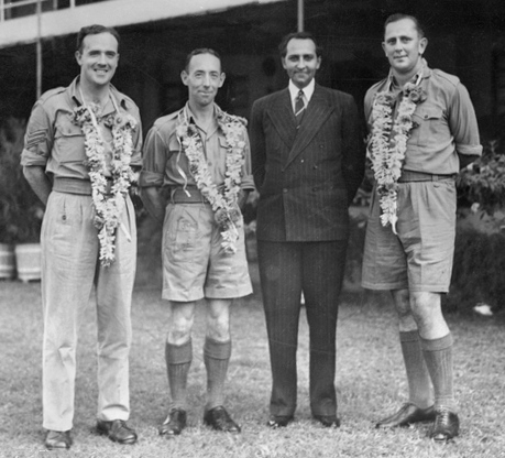 Per link